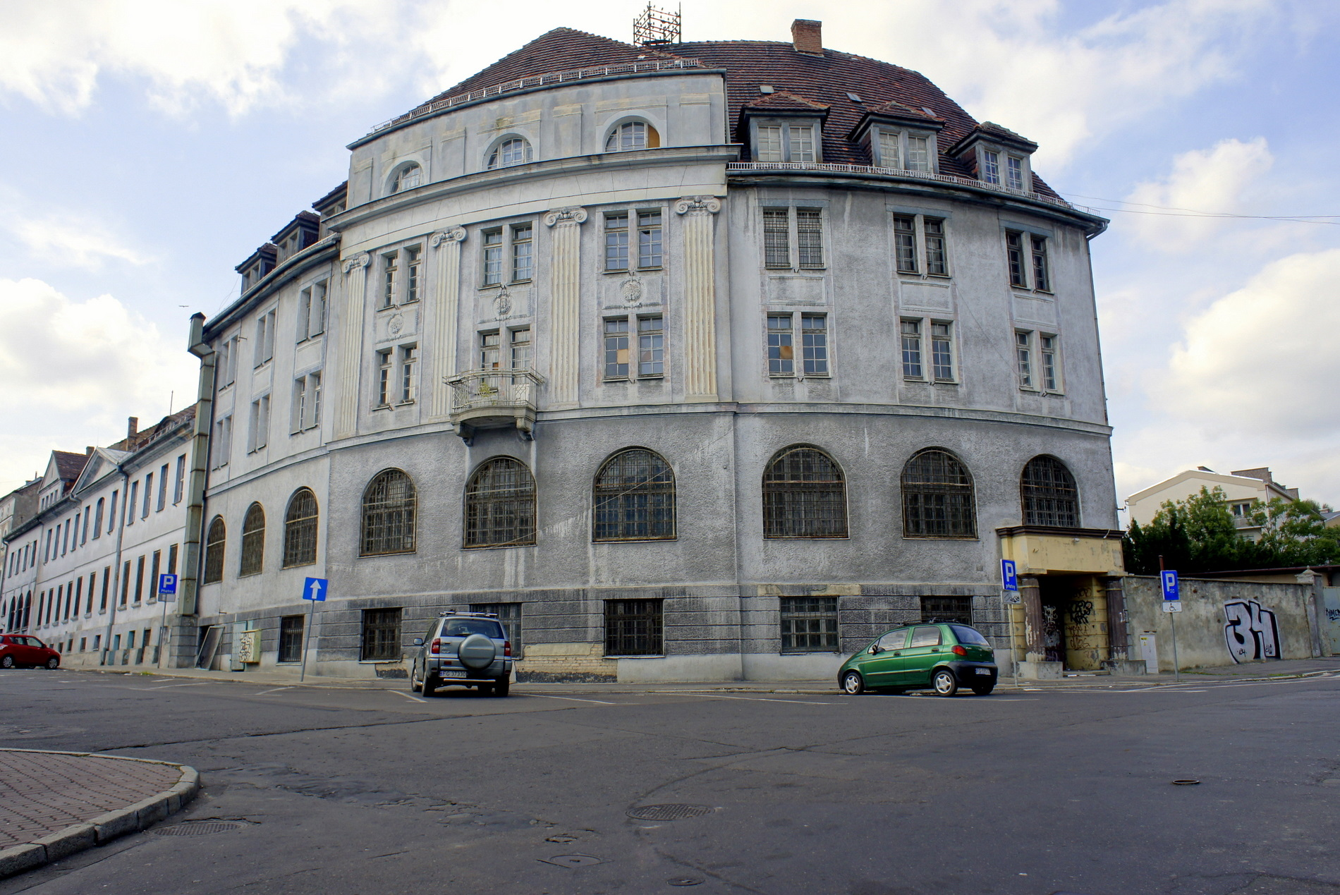 Gorzów Wielkopolski, ul. Obotrycka 16 - gmach ratusza wybudowany w latach 1923 - 1924. W 1945 r.- sowiecka Komendatura Wojenna, w latach 1946-1950 - Ekspozytura Urzędu Woj. Poznańskiego, od 1953 r. - Powiatowy Urząd Bezpieczeństwa Publicznego, następnie Milicja, po zmianie ustroju - Policja. Od 2003 r. własność Miasta (zabytek nr L-195/1-2/A)